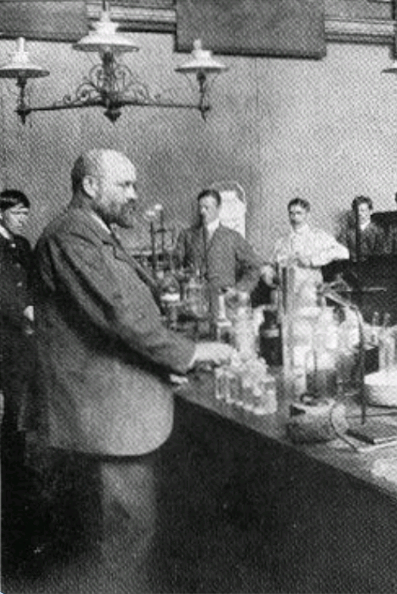 Heinrich Jakob Goldschmidt (* 12. April 1857 in Prag; † 20. September 1937 in Oslo)